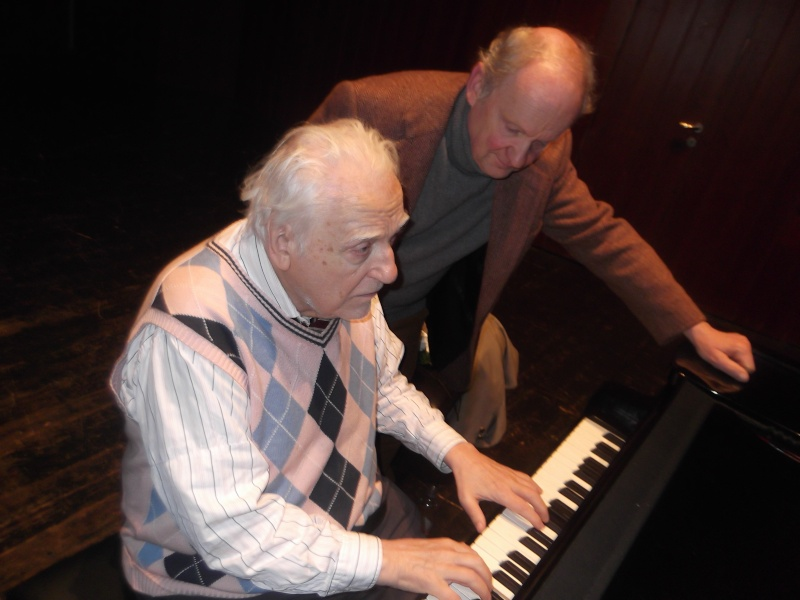 Jorg Demus und Manfred Jahn